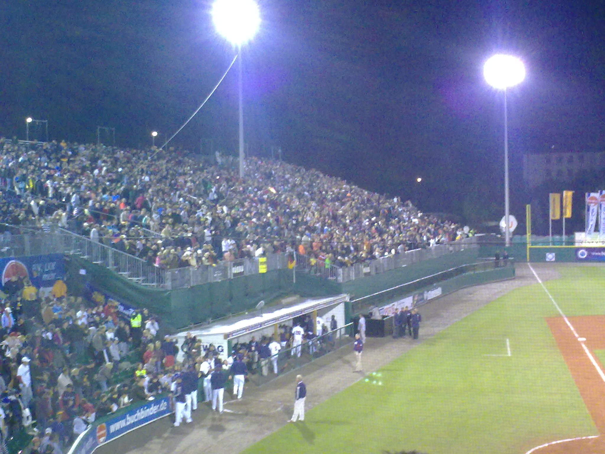 Volle Zusatztribüne während der Baseball WM 2009 (Deutschland - USA)